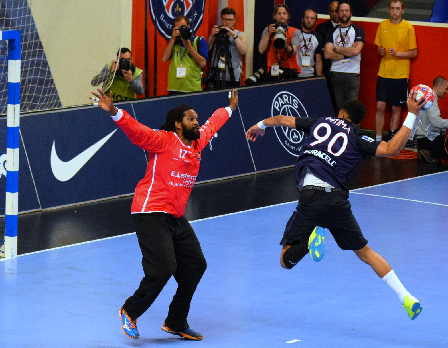 PSG Handball / Toulouse Fenix Handball lors de la 21e journée du championnat de France de handball masculin le 16 avril 2016 au stade Pierre de Coubertin à Paris.